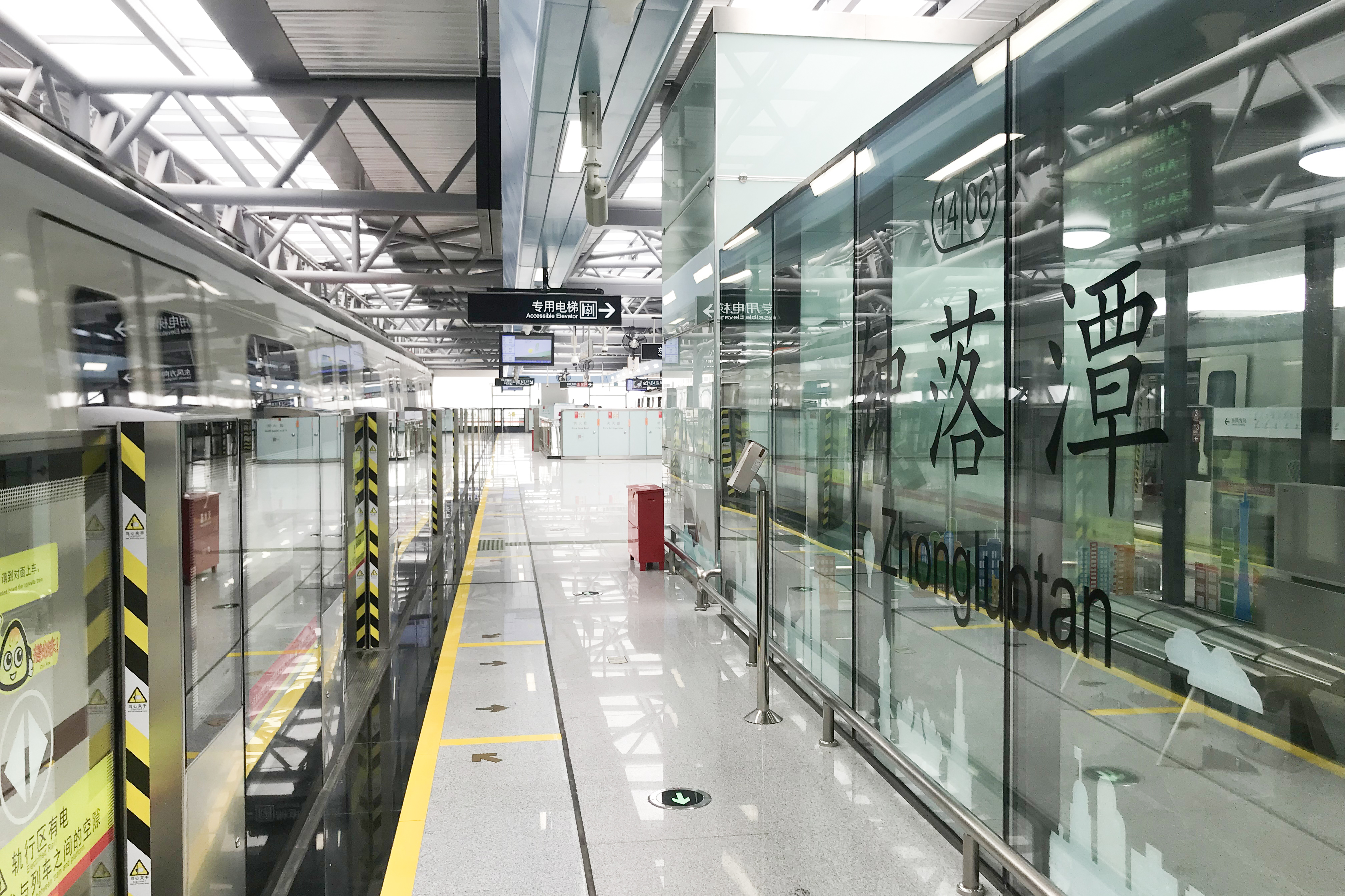 广州地铁钟落潭站